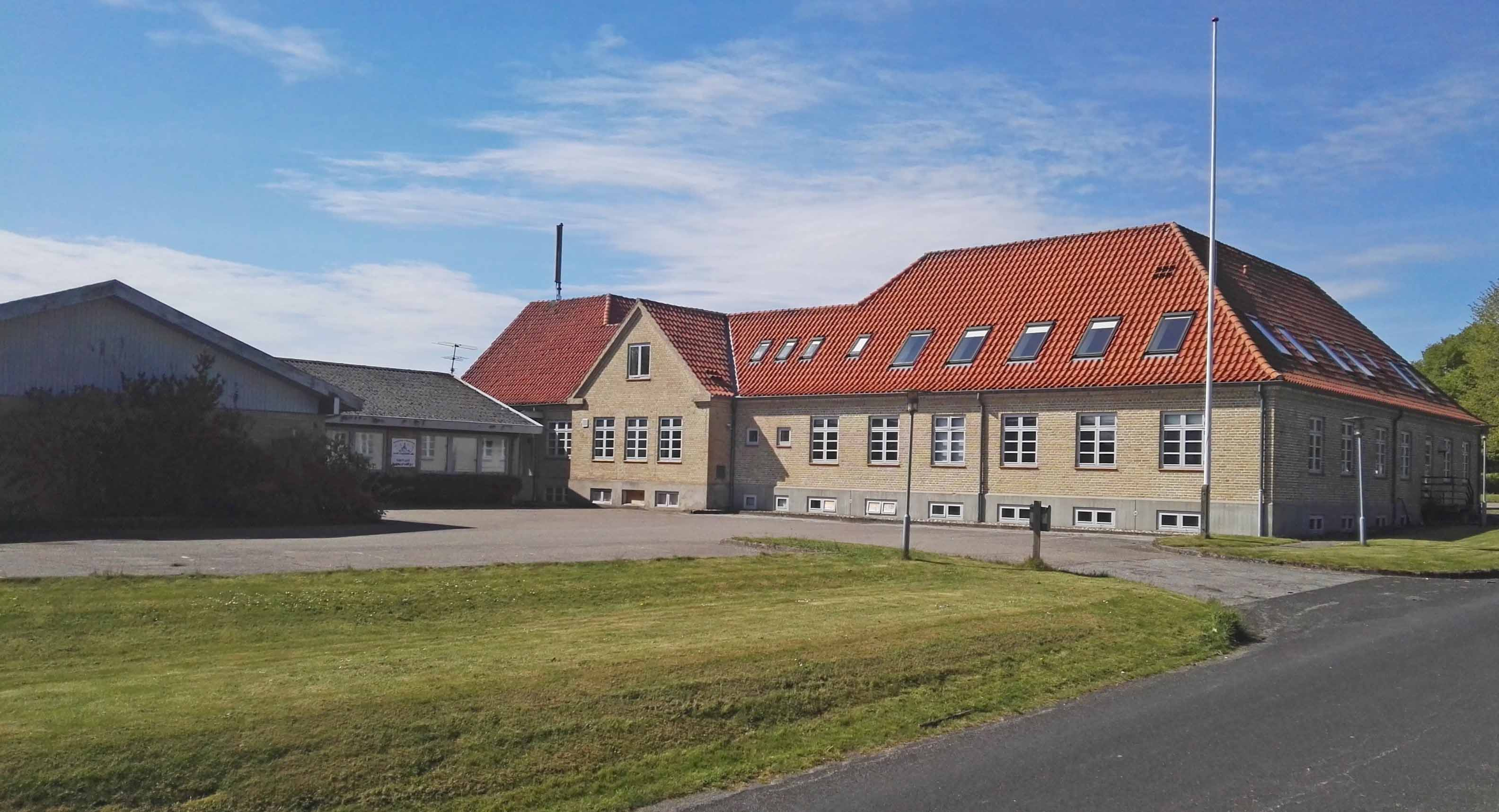 Nørhald Kommunes rådhus på Udbyhøjvej 483 i Tvede